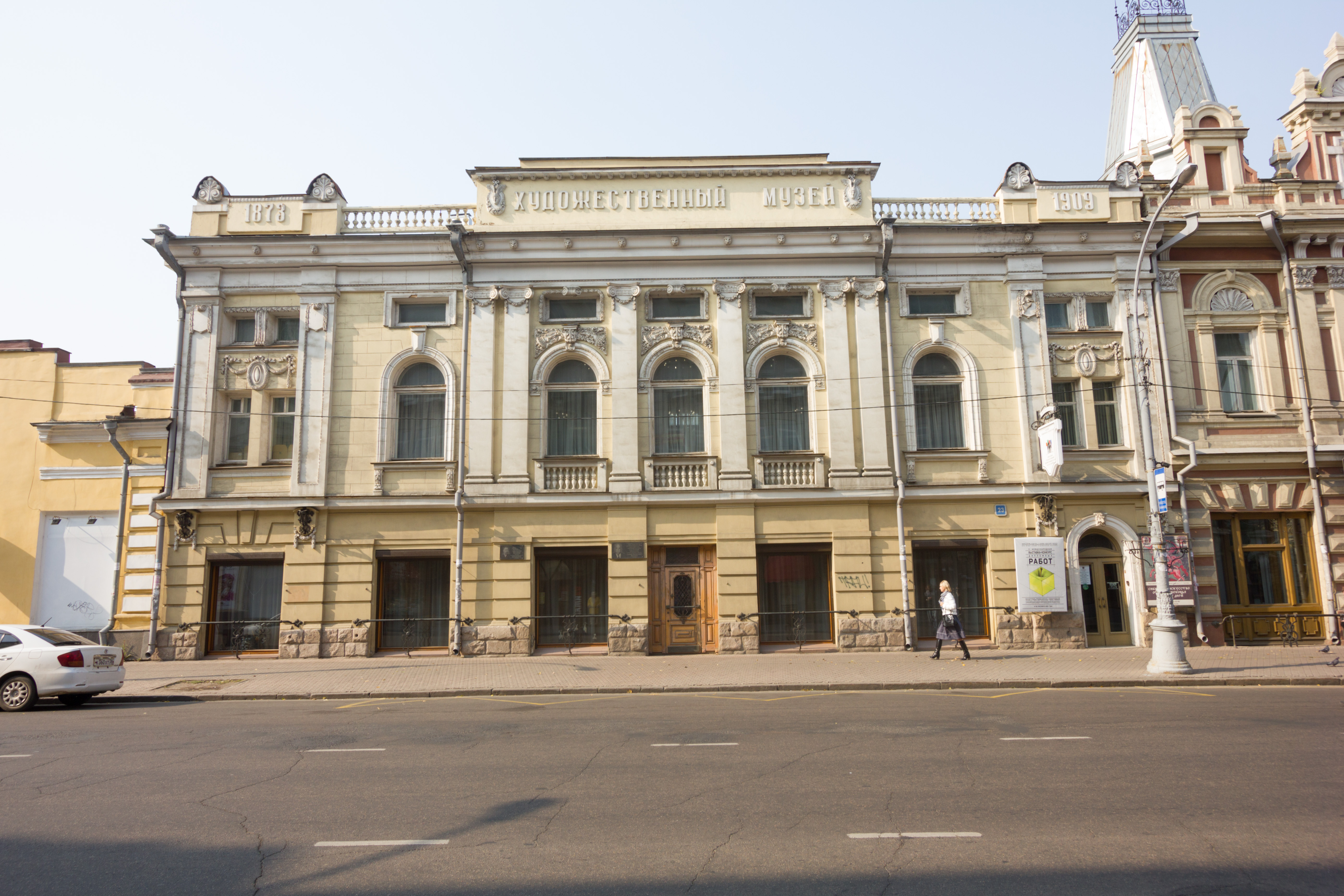 Здание сибирского торгового банка: улица Карла Маркса, 23, Иркутск, Иркутская область. Сейчас: Отдел Сибирского искусства Иркутского областного художественного музея им. В.П. Сукачева